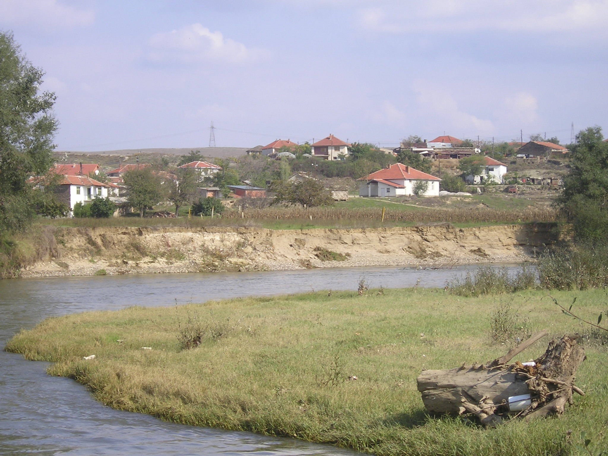 Долната махала на село Ногаевци и реката Вардар, Република Македония.